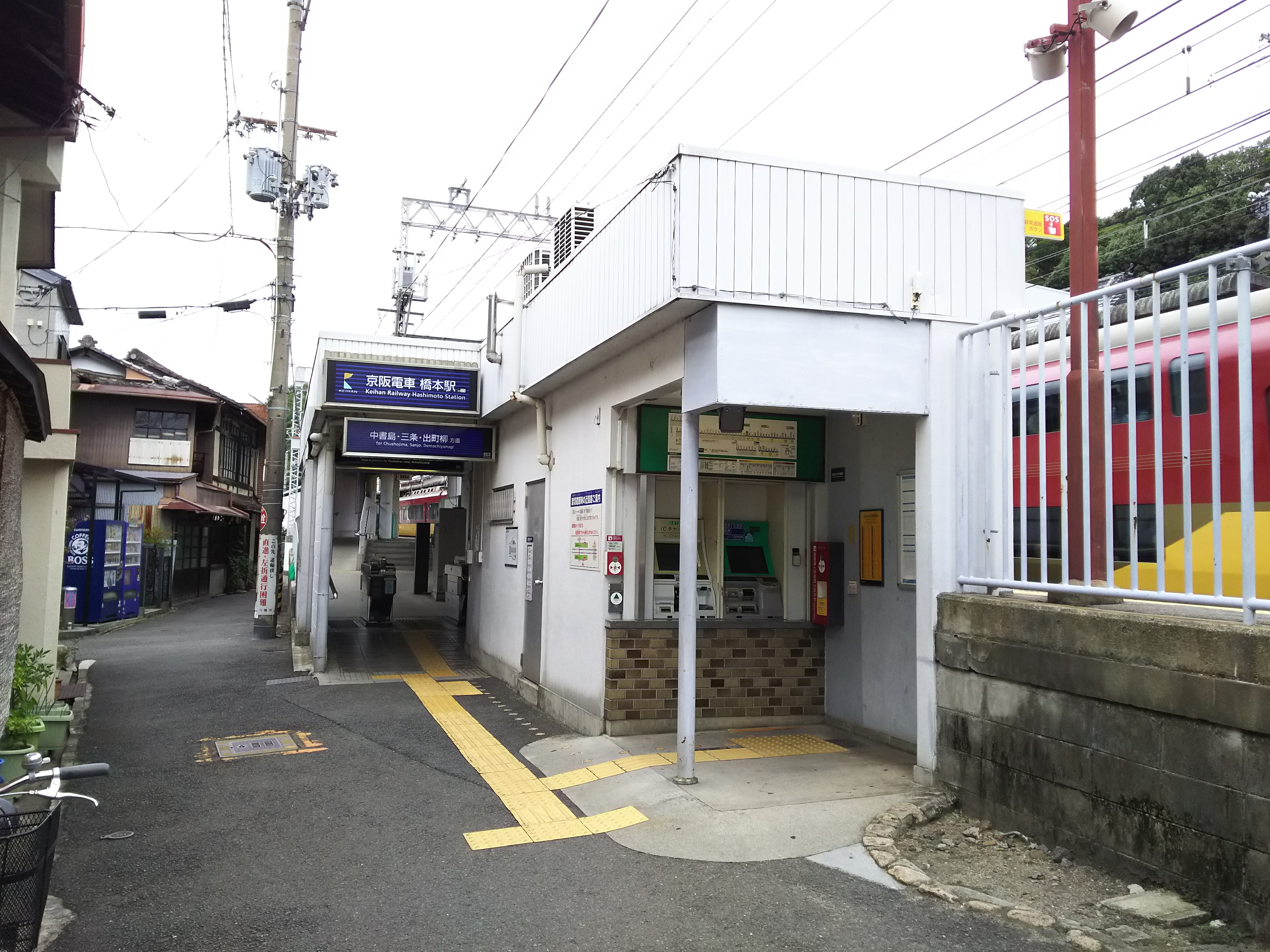 京阪本線橋本駅出町柳方面改札（京都府八幡市）